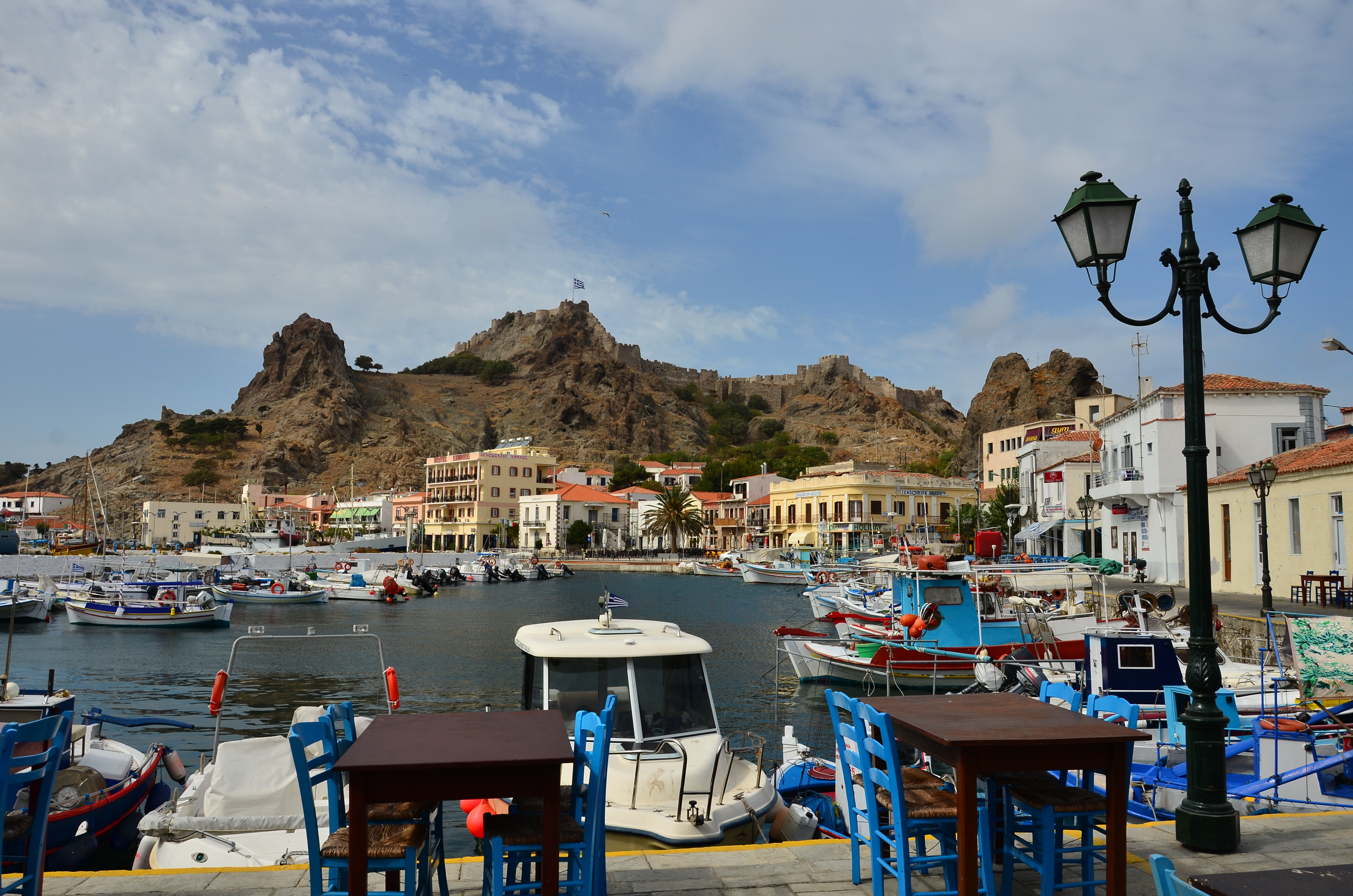 εικόνα απο την Μύρινα